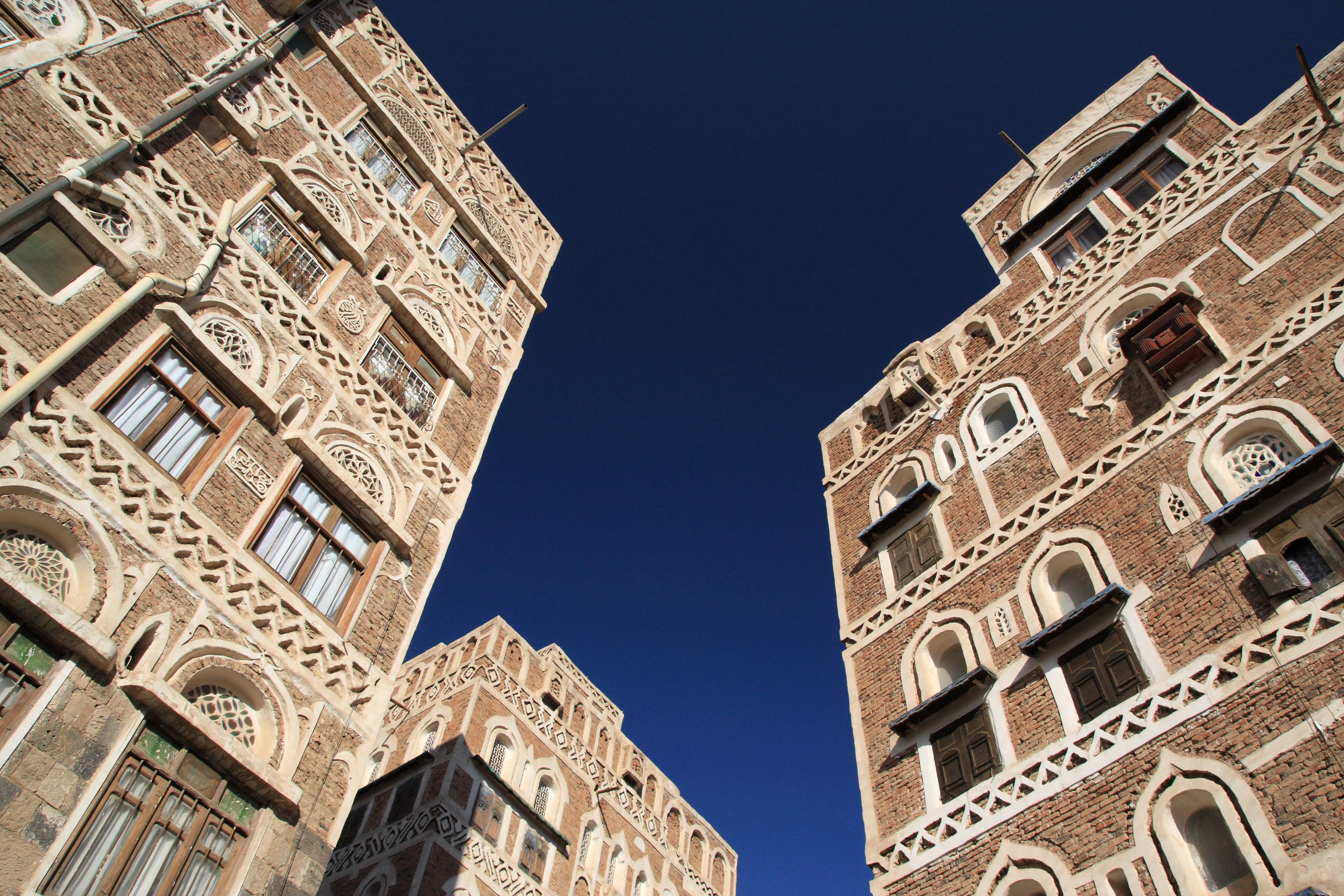 Buildings in Sana'a